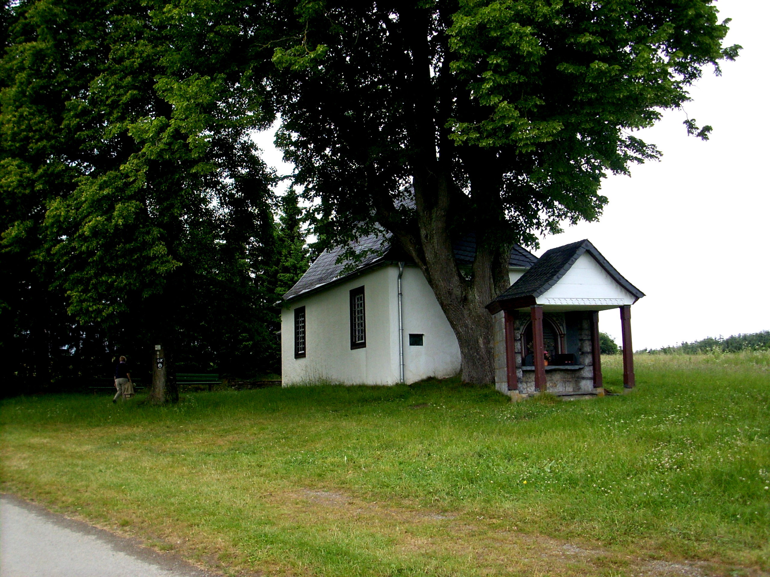 Hallohkapelle, Meschede-Wallen This is a photograph of an architectural monument.